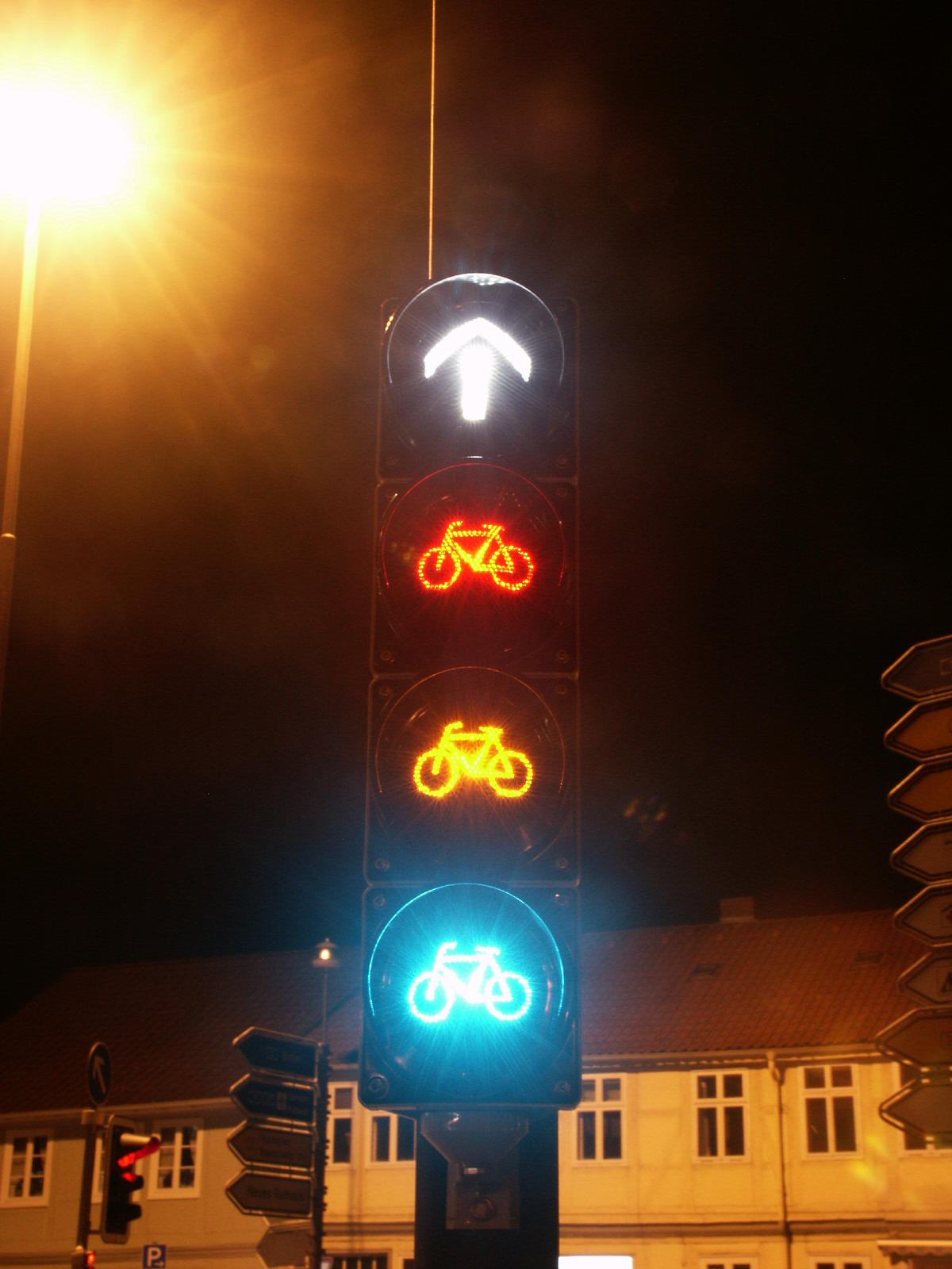 Langzeitbelichtung am Beispiel einer Ampel